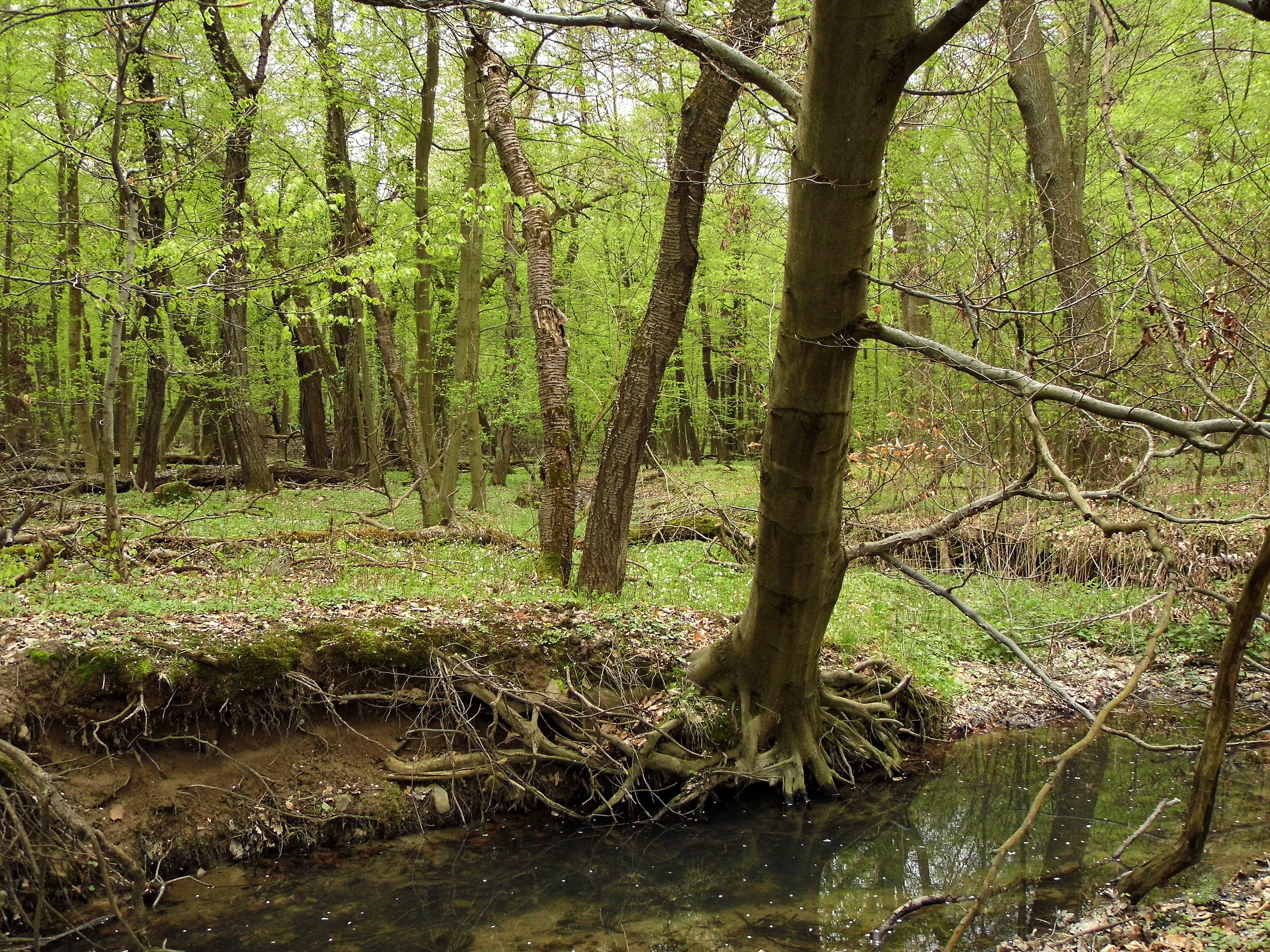 návšteva